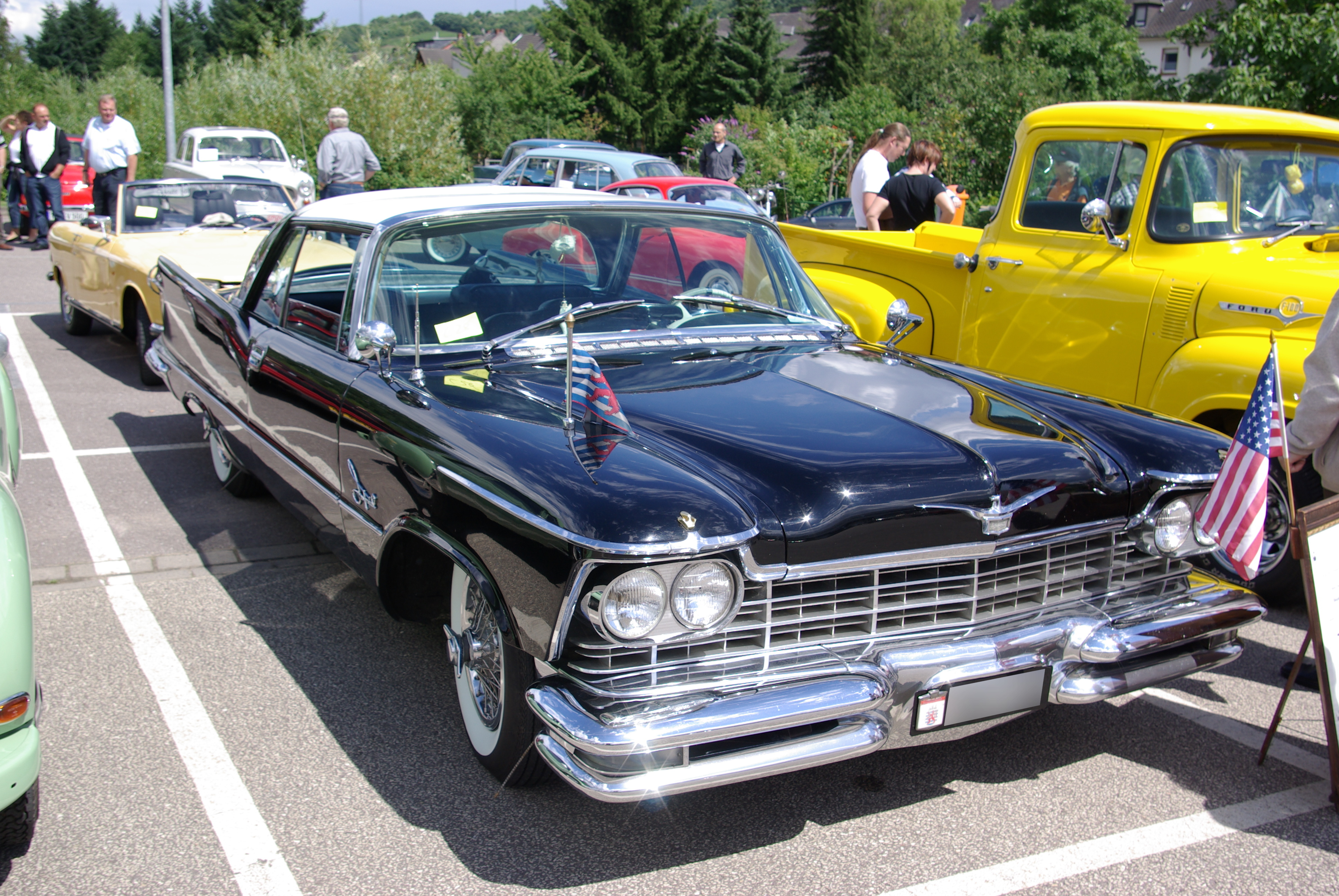 Chrysler Imperial Crown Baujahr 1957